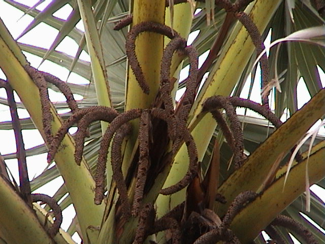 Inflorescence du rondier(003) - Inde 2004 proche de Pondichéry